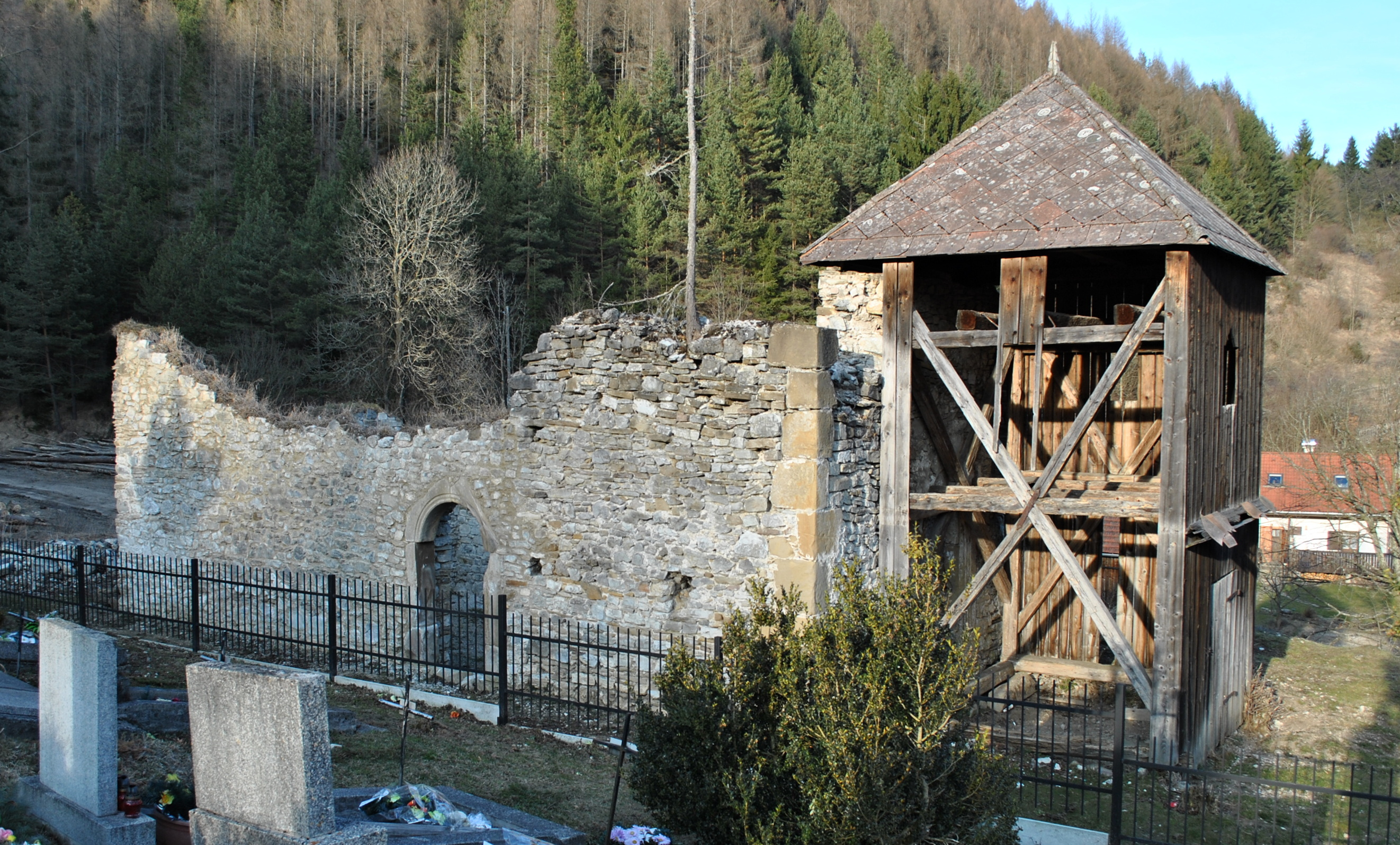 Kostol ruina